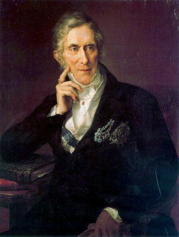 Retrato del politico español Evaristo Pérez de Castro (1778-1849), que llegó a ser presidente del Consejo de Ministros entre 1838 y 1840, durante el reinado de Isabel II.